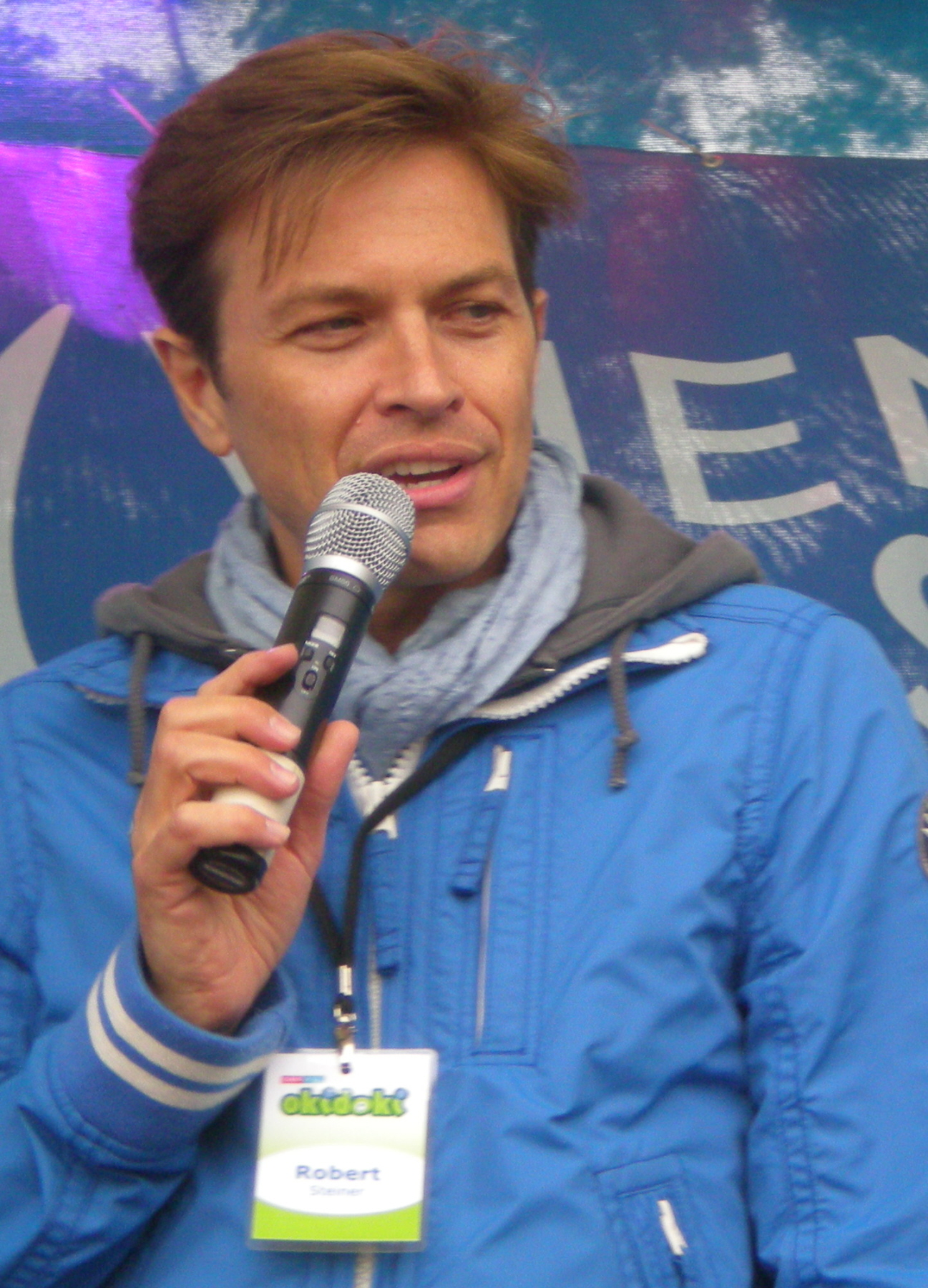 Robert Steiner beim Alles-Wasser-Fest auf dem Areal des Behälters Wienerberg in Wien-Favoriten